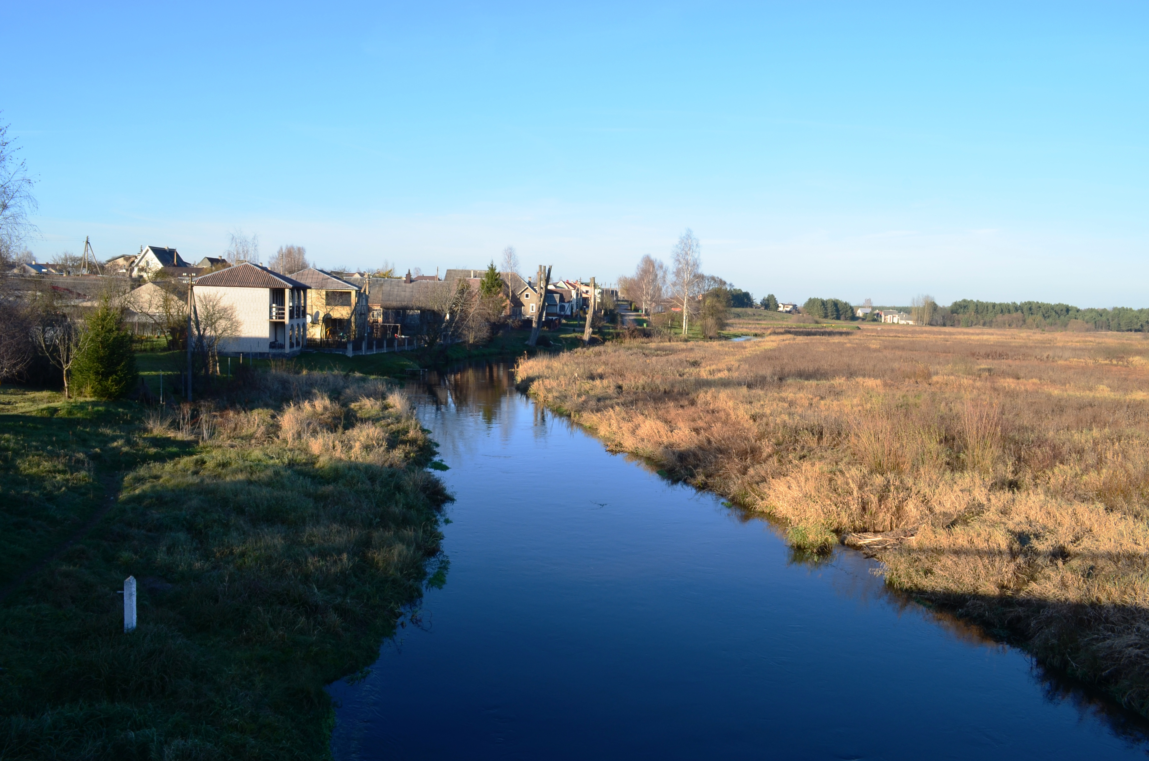 Vilnia, Mickūnai, Vilniaus raj.